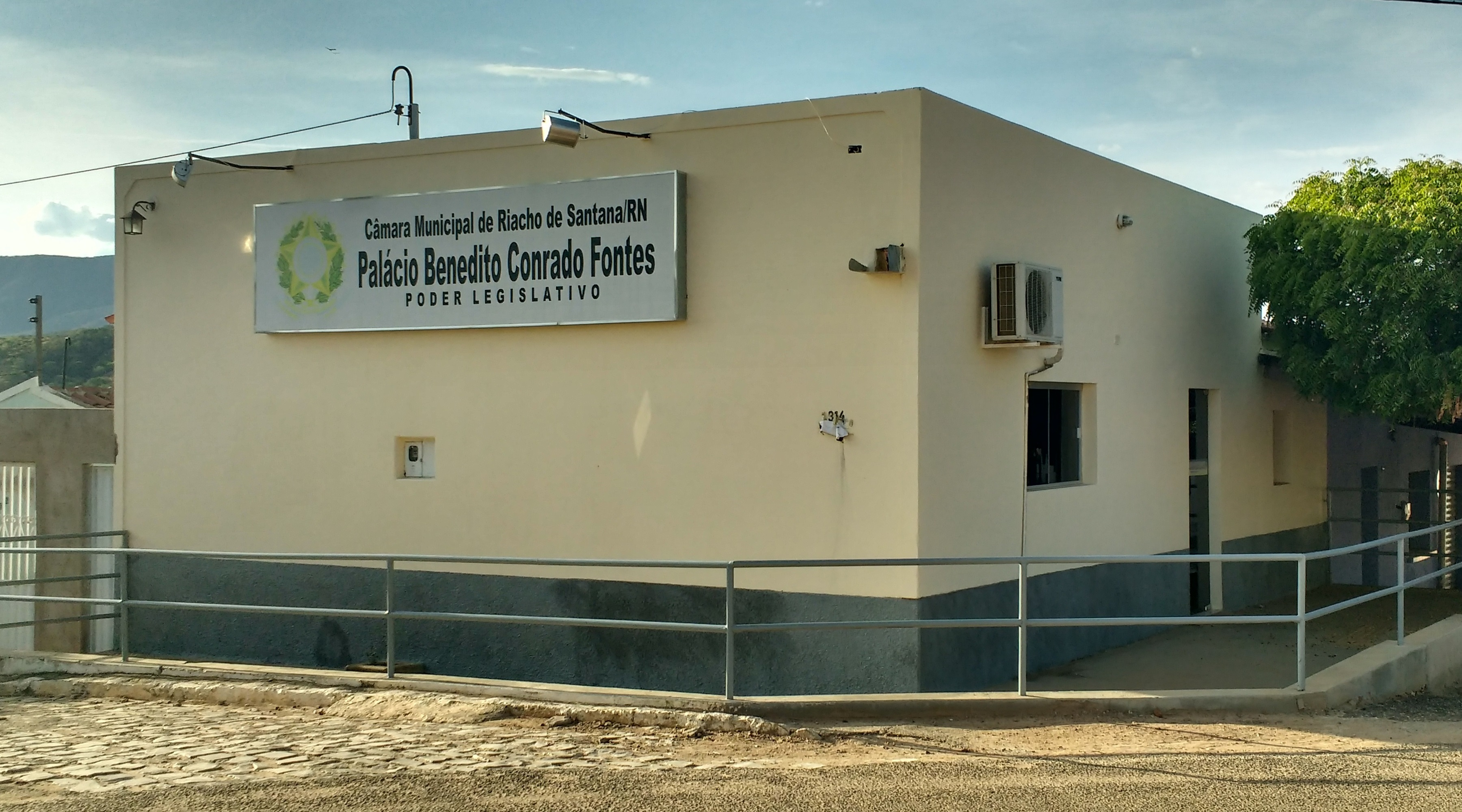 Palácio Benedito Conrado Fontes, onde funciona a Câmara Municipal de Riacho de Santana, Rio Grande do Norte (Brasil), sede do legislativo